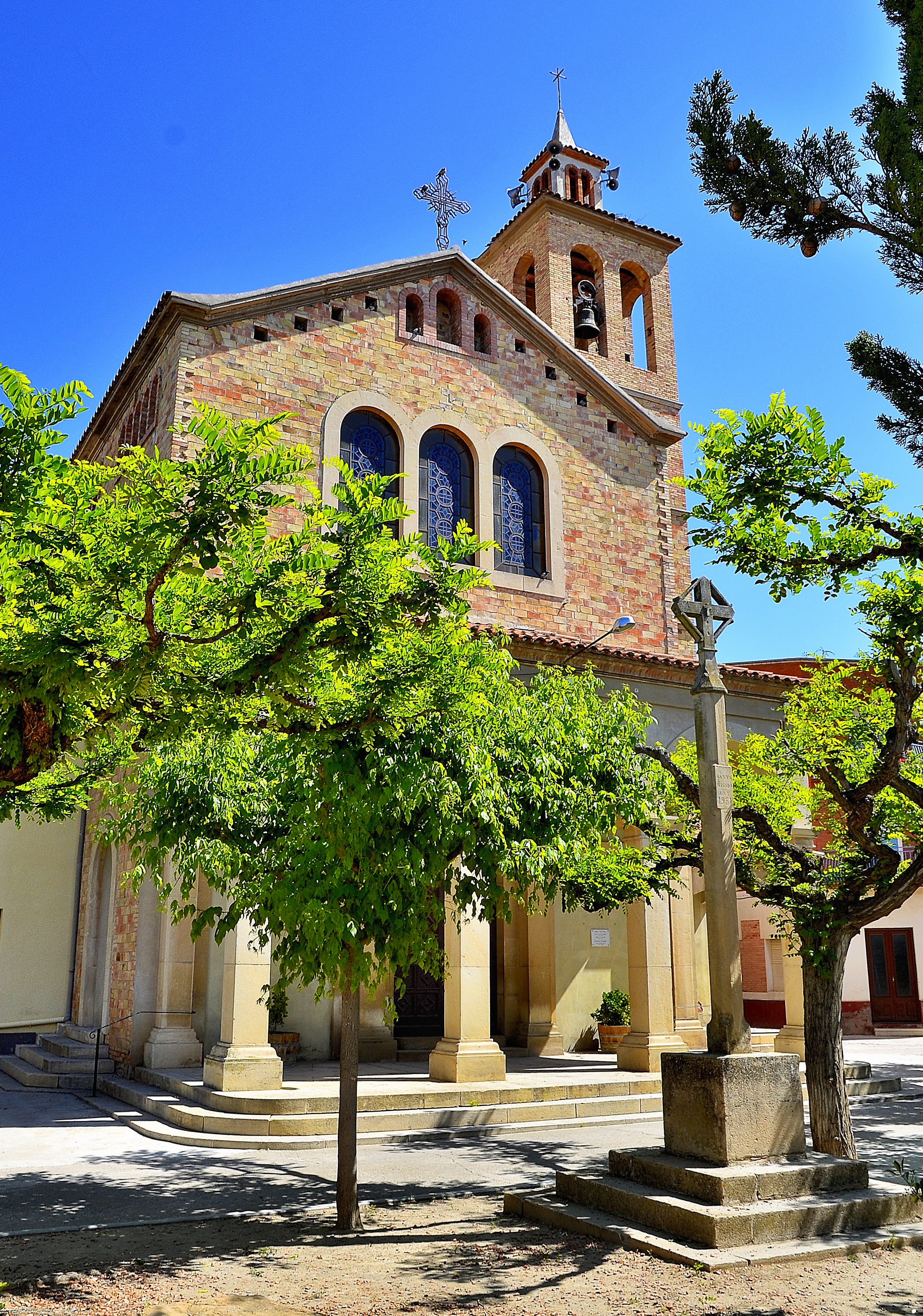 Sant Joan Baptista (Penelles)